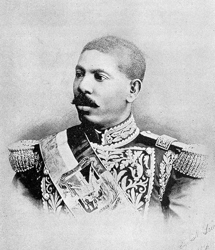 Ulises Hereaux (lilis), president of the Dominican Republic from 1 September 1882 to 1 September 1883, from 6 January to 27 February 1887 and again from 30 April 1889 until his assassination